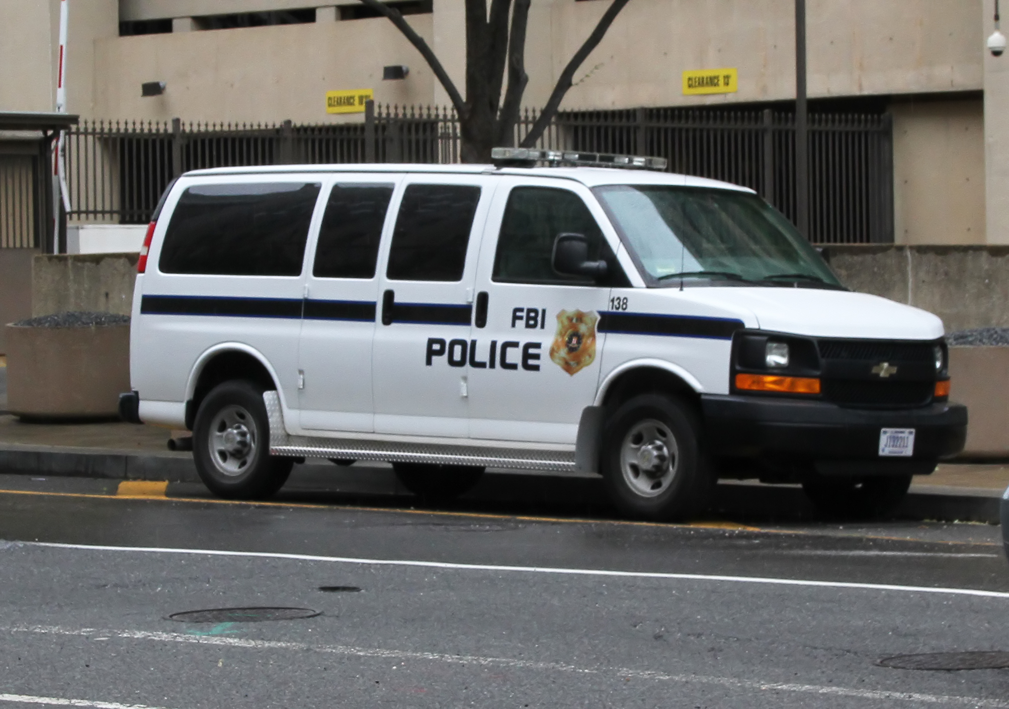 F.B.I. Police automobiles